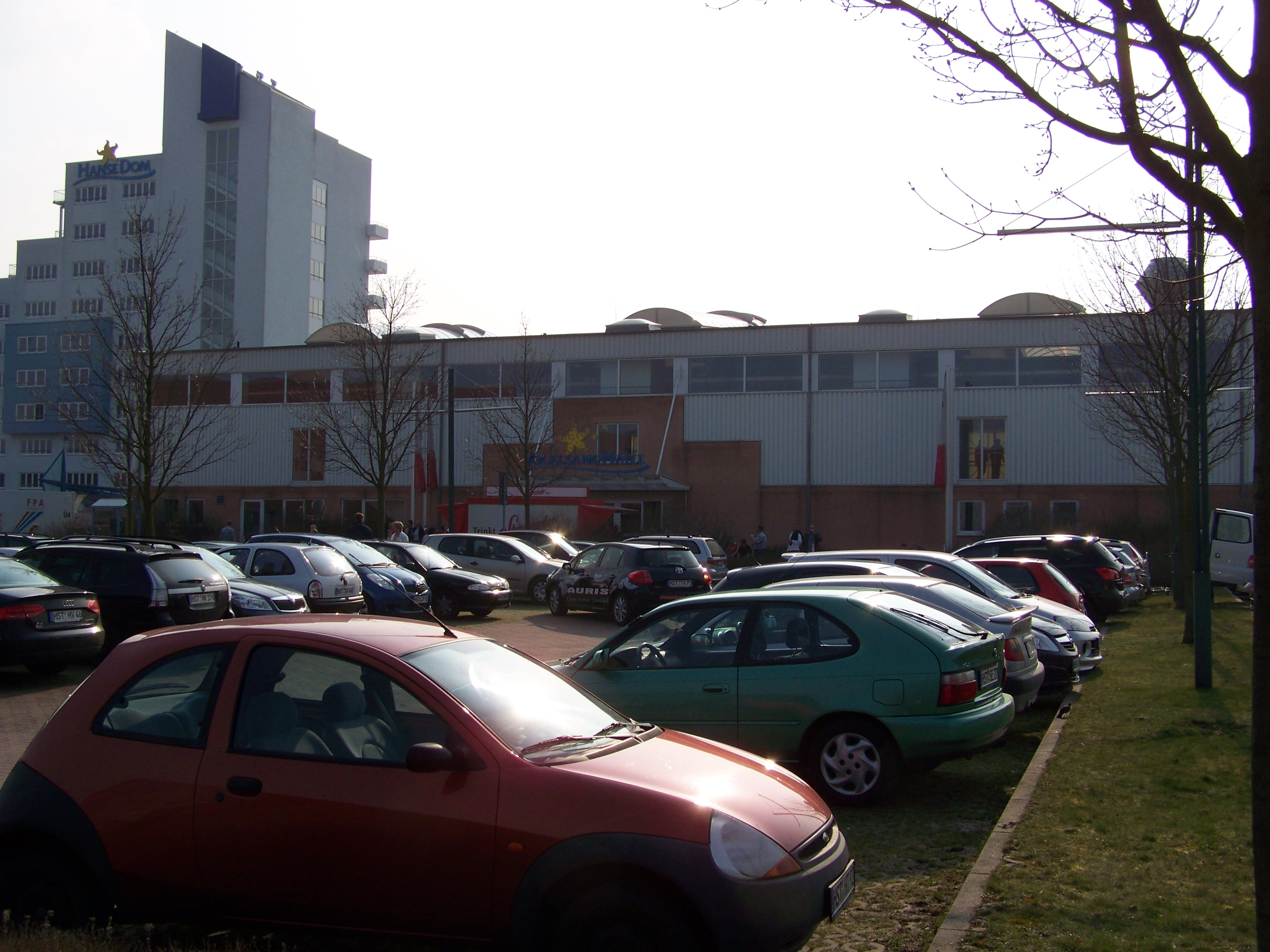 Die Vogelsanghalle Stralsund am 4. April 2009.